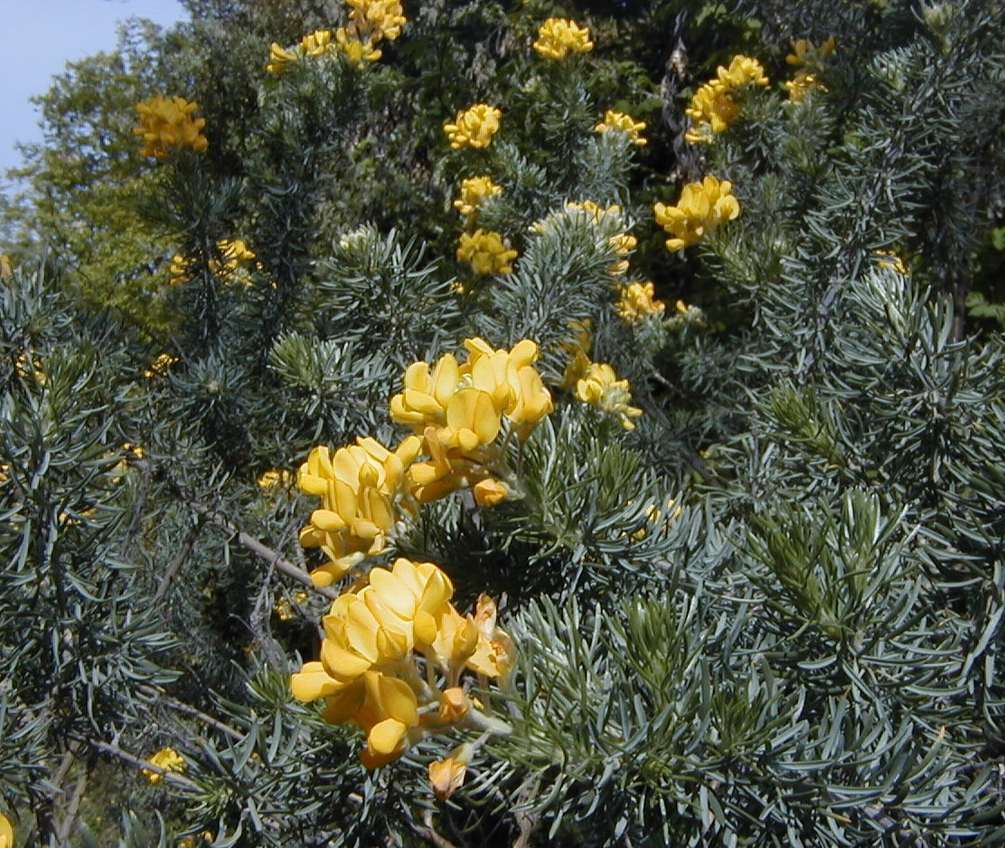 Adenocarpus decorticans. Real Jardín Botánico, Madrid.